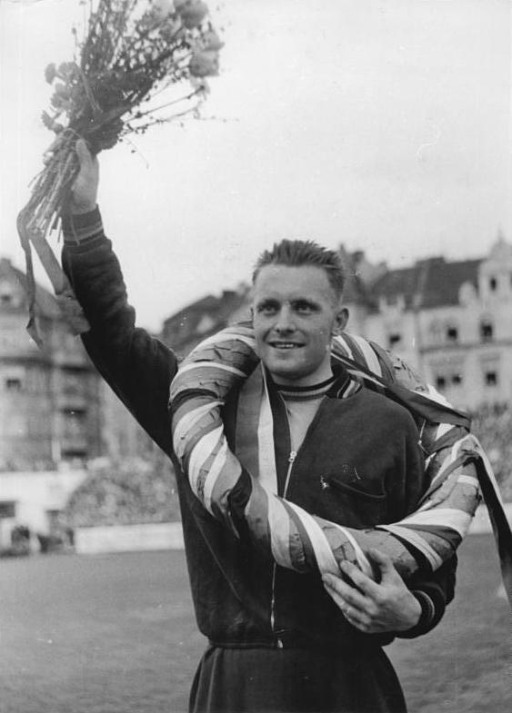 Maurice Boeckx Zentralbild Kronfeld Bey-Ho 3.5.1955 VIII. Internationale Friedensfahrt Prag-Berlin-Warschau. Auf der ersten Etappe "Rund um Prag". UBz: Der belgische Etappensieger Maurice Boeck.